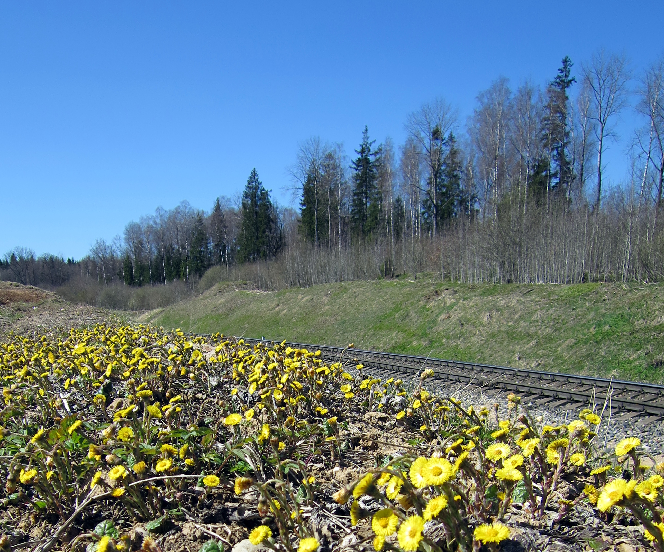 Pavasara diena Rudbāržu pagastā.